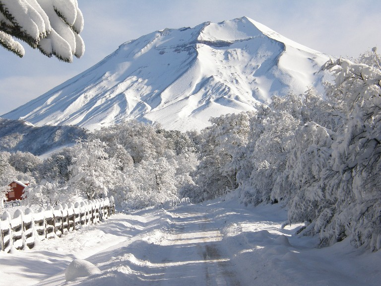 Volcán Lonquimay en el invierno de 2011. Fotografía por Leonardo Araya.